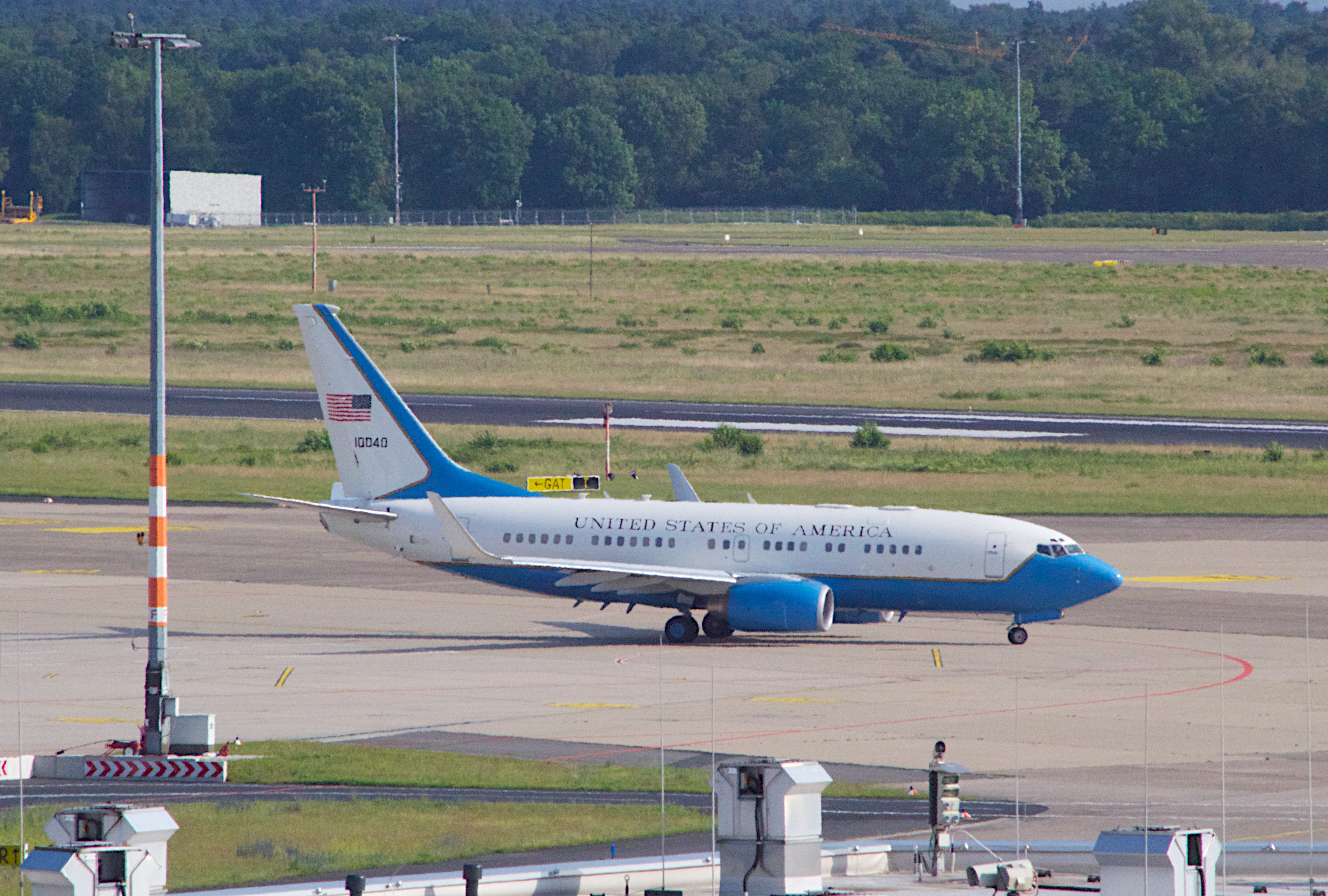 USAF am Flughafen Köln/Bonn.